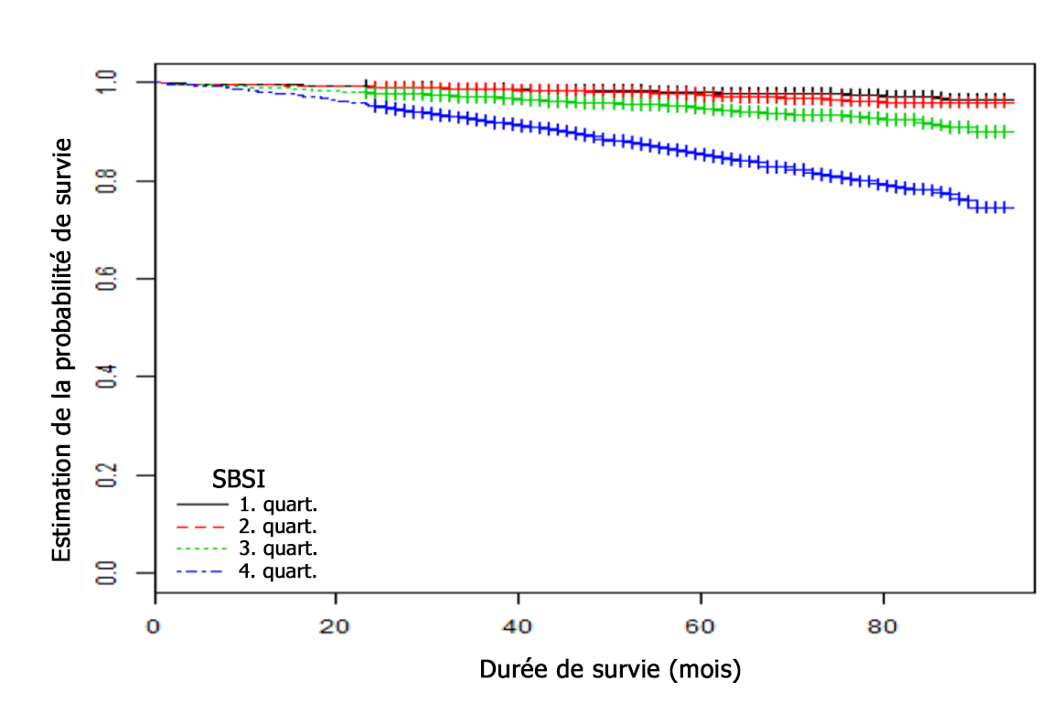 Statistique de Kaplan-Meier de la probabilité de survie déterminée sur une cohorte test pour les quatre inter-quartiles du SBSI..